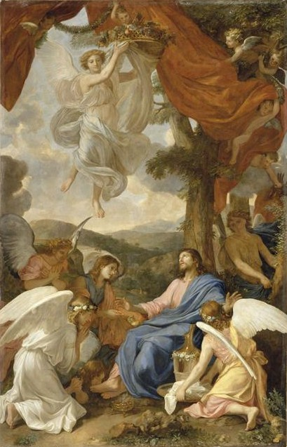 Le Christ au désert servi par les angeslabel QS:Lfr,"Le Christ au désert servi par les anges"